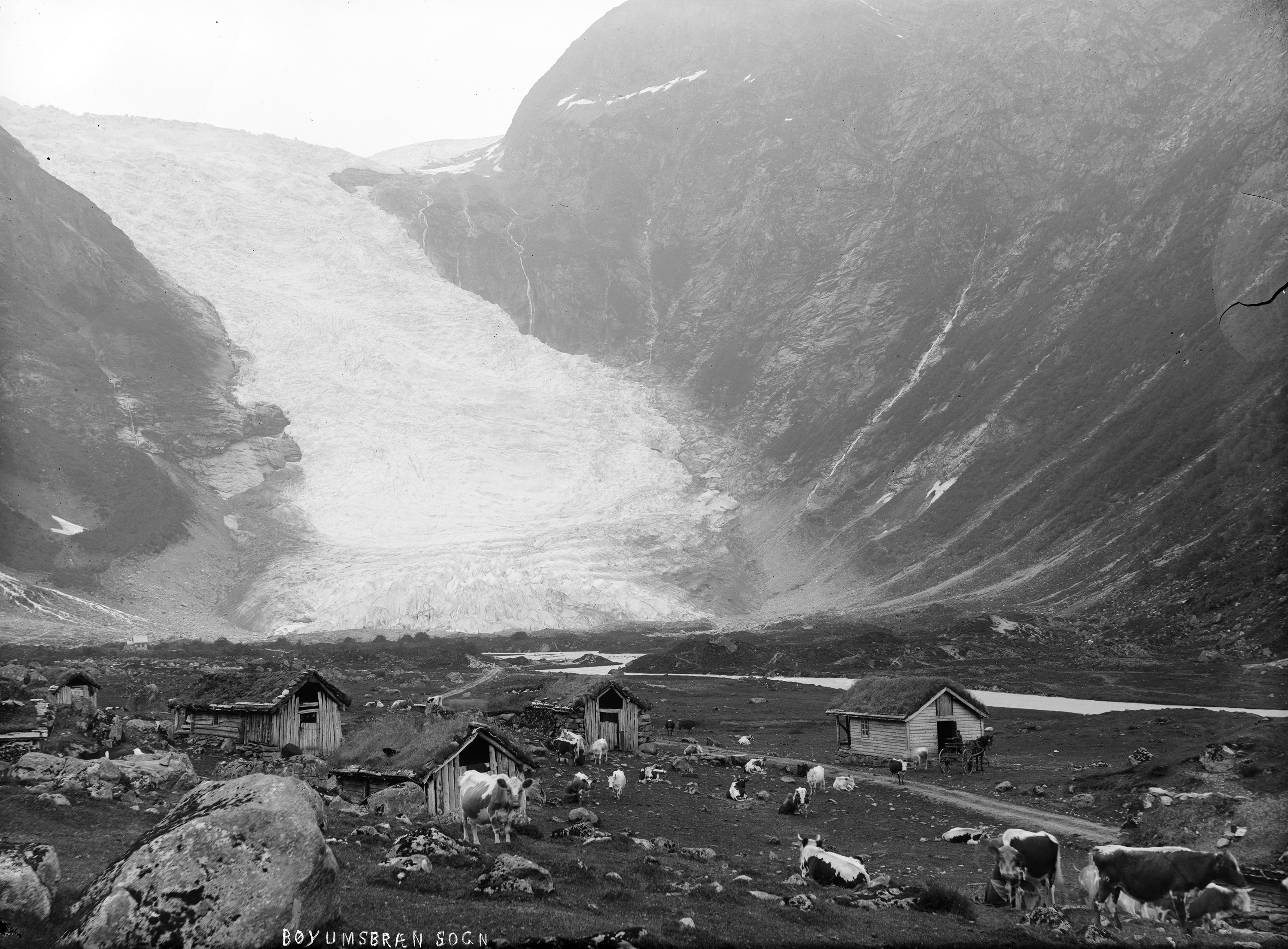 SFFf-100319.181243 Original caption: "Bøyumsbræn Sogn". The Bøyabreen glacier in Fjærland, Sogn og Fjordane, ca 1890-1910.